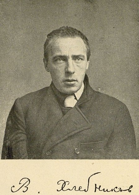 Велимир Хлебников. Комментарий к фотографии от издательства: "Фотография В. Хлебникова относится к 1916 году ко времени его пребывания на Украине. На фотографии он снят вместе с Г.Н. Петниковым, любезно предоставившим её издательству по нашей просьбе"